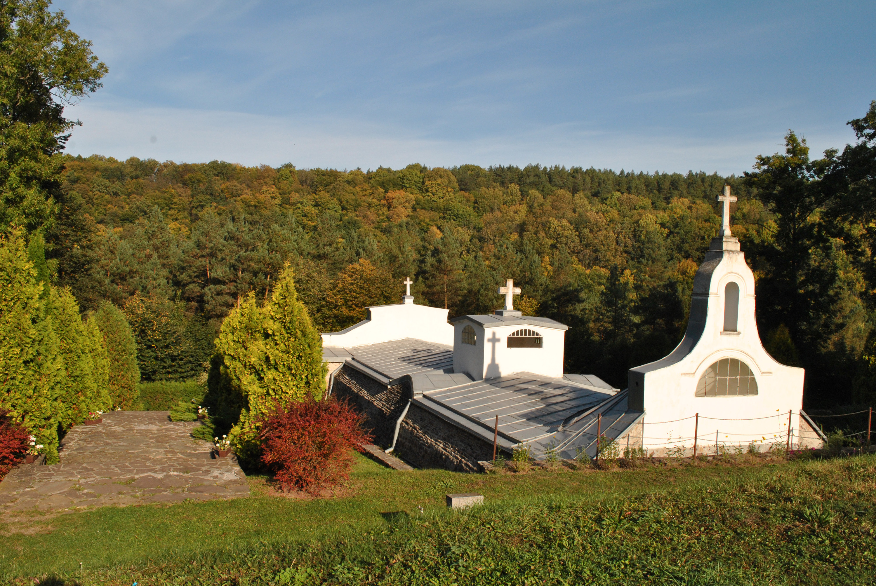 Гробниця Блаженної Марцеліни Даровської у парку біля палацу в с. Язловець Бучацького району.